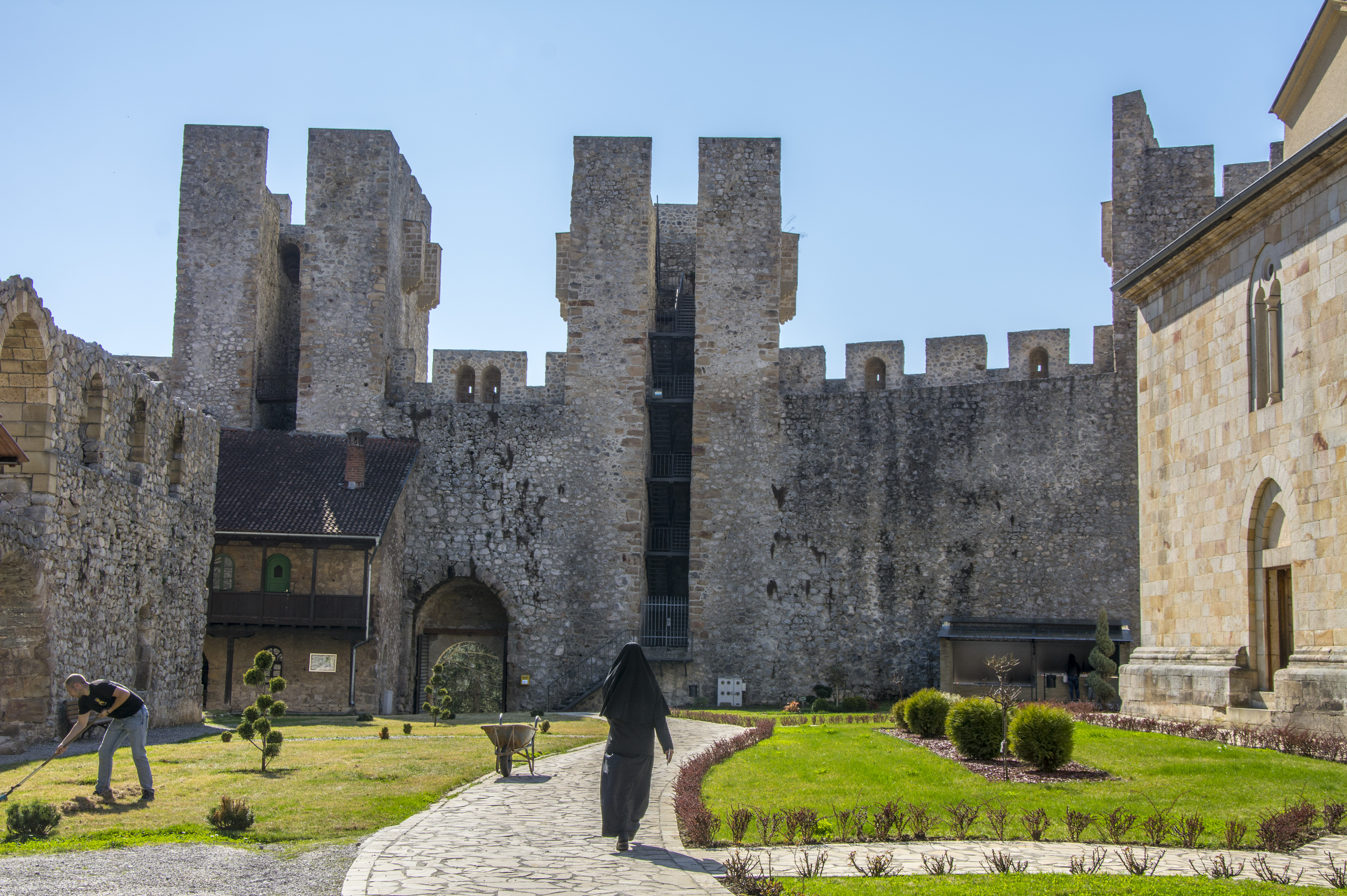 Поглед на двориште и куле